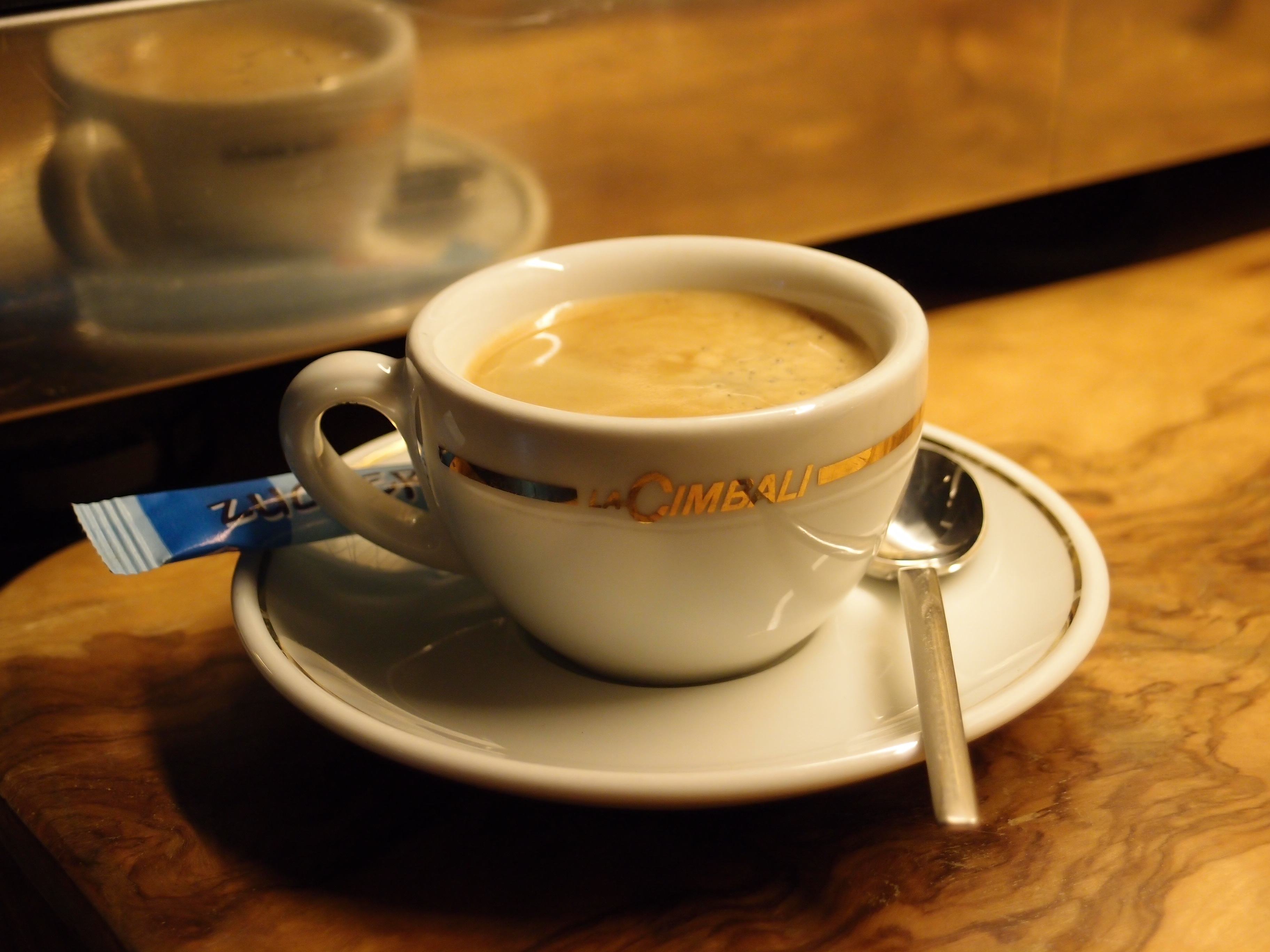 Ein Espresso, hergestellt mit Espressomaschine La Cimbali M21 Junior Datum: 20.08.2011 Urheber: M. Pfeiffer alias Benutzer:Gordito1869 Quelle: privates Fotoarchiv des Urhebers